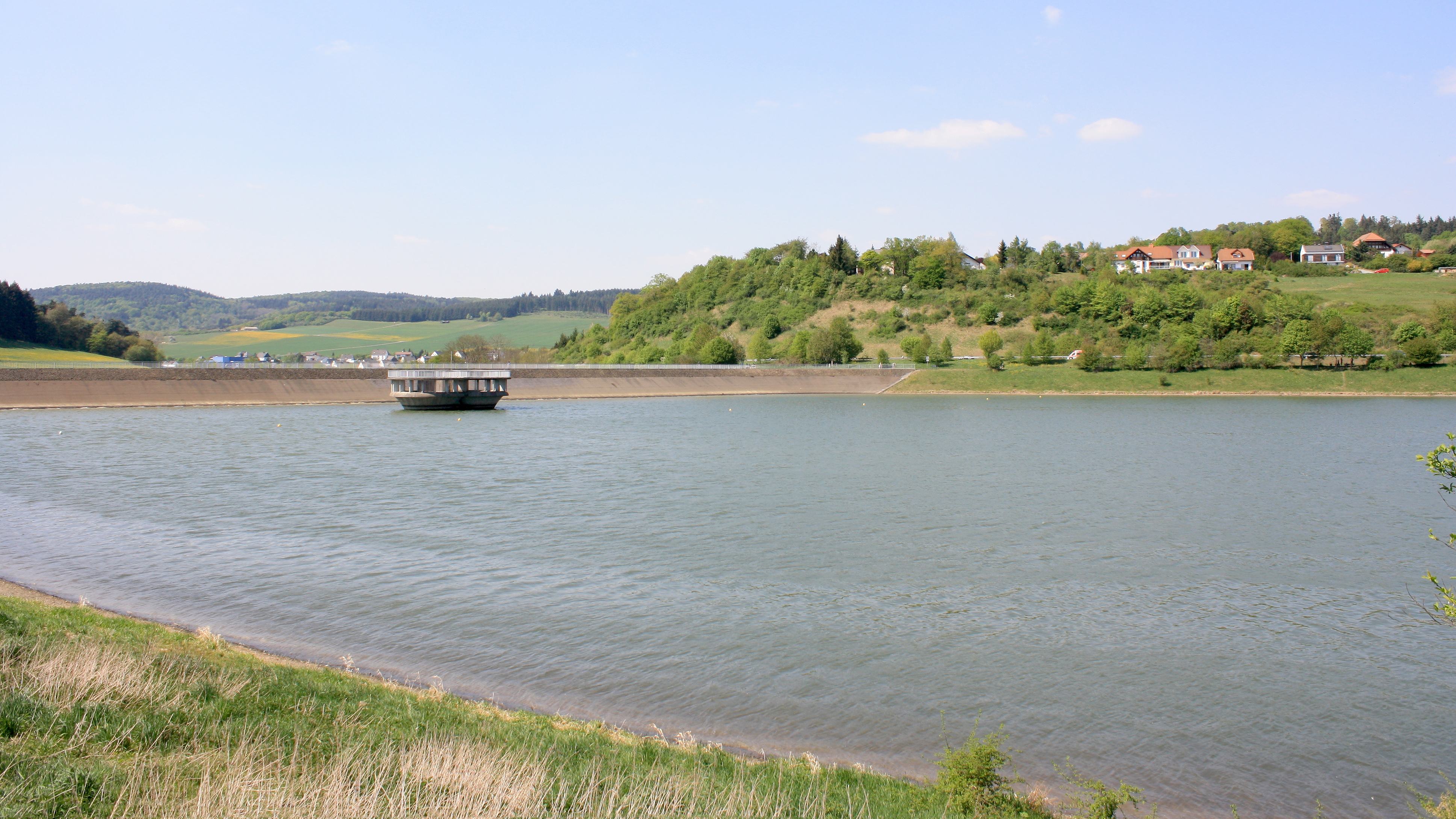 Aartalsee, Blick vom Nordufer auf die Hauptsperre